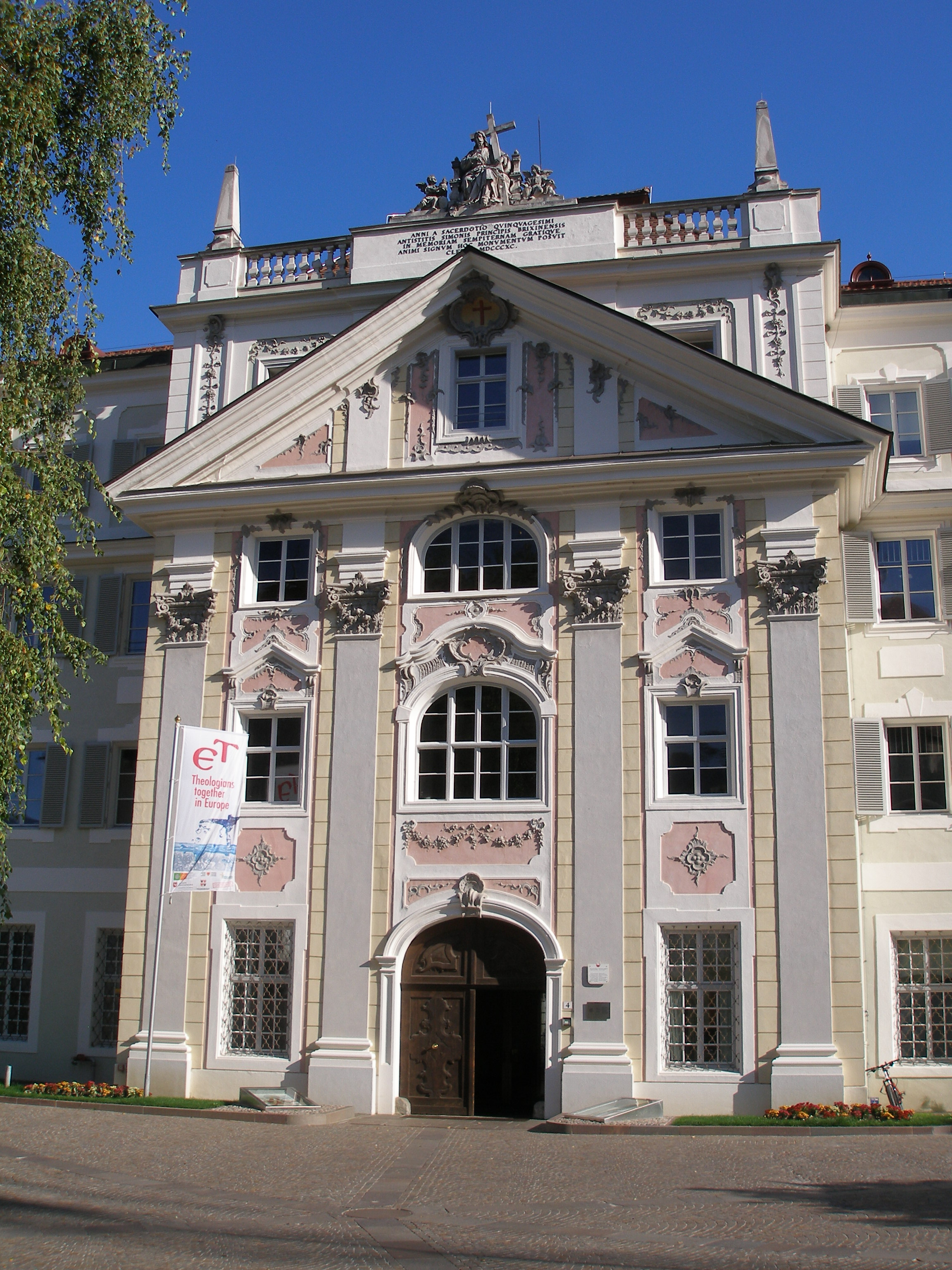 Priesterseminar mit Heiligkreuzkirche in Brixen